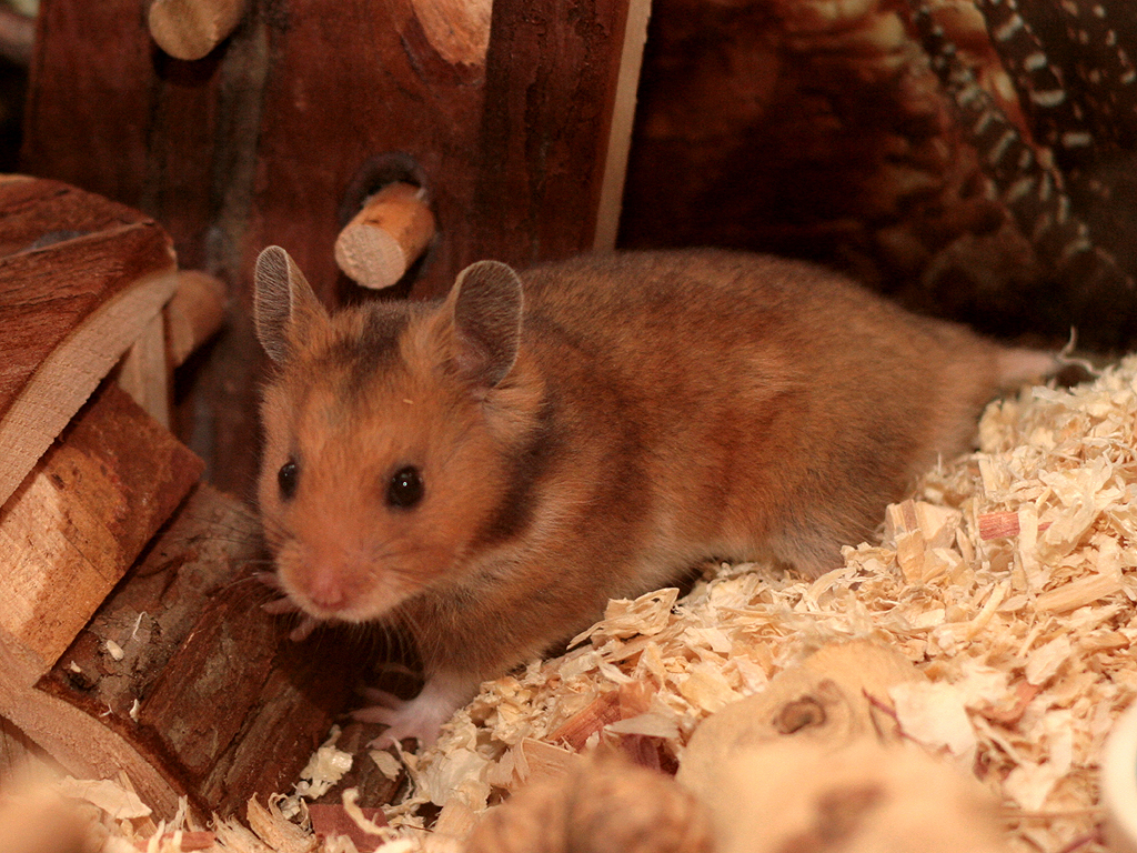 Goldhamster im Käfig